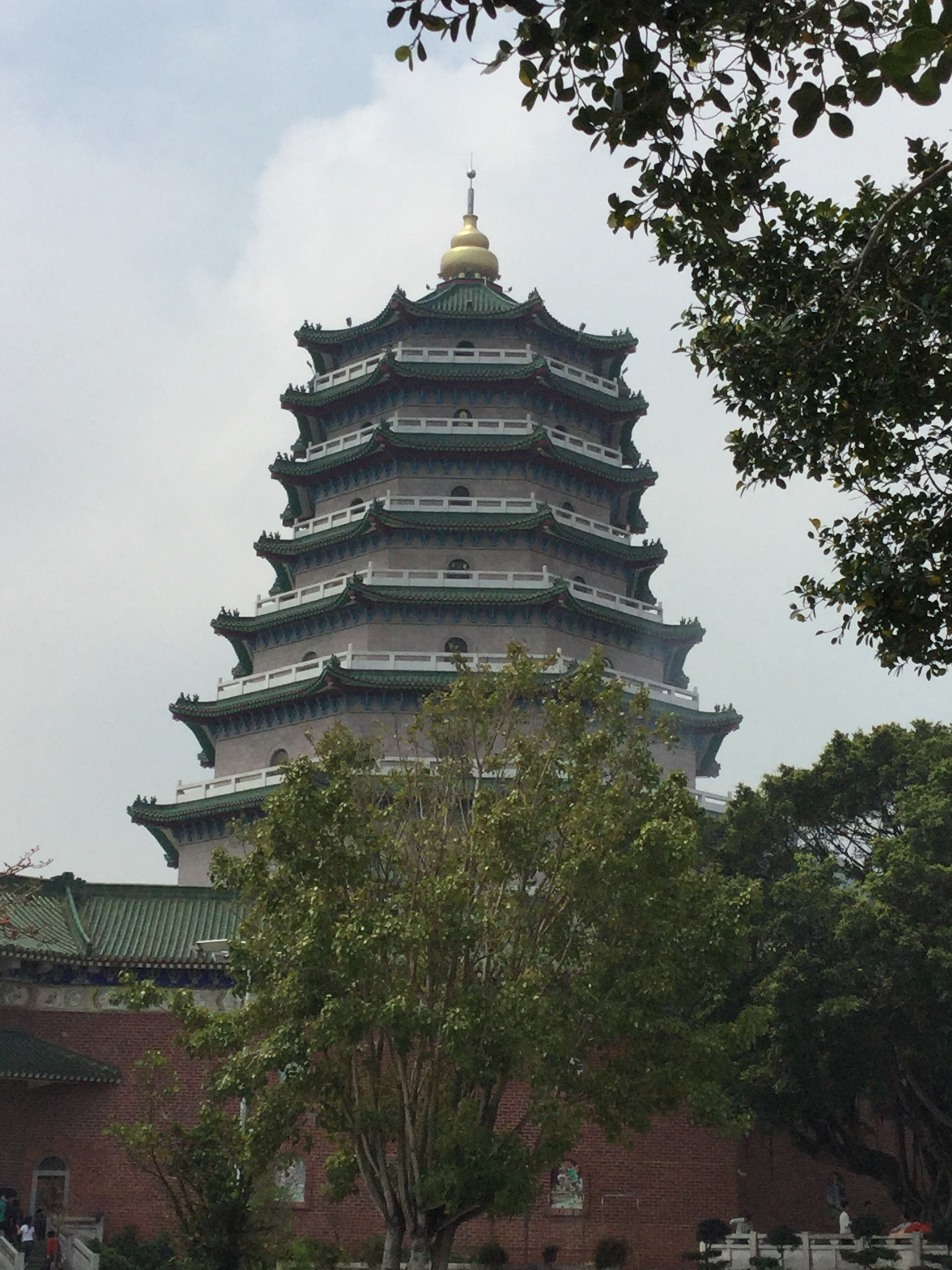 九天玄女万佛宝塔，汕头天坛花园